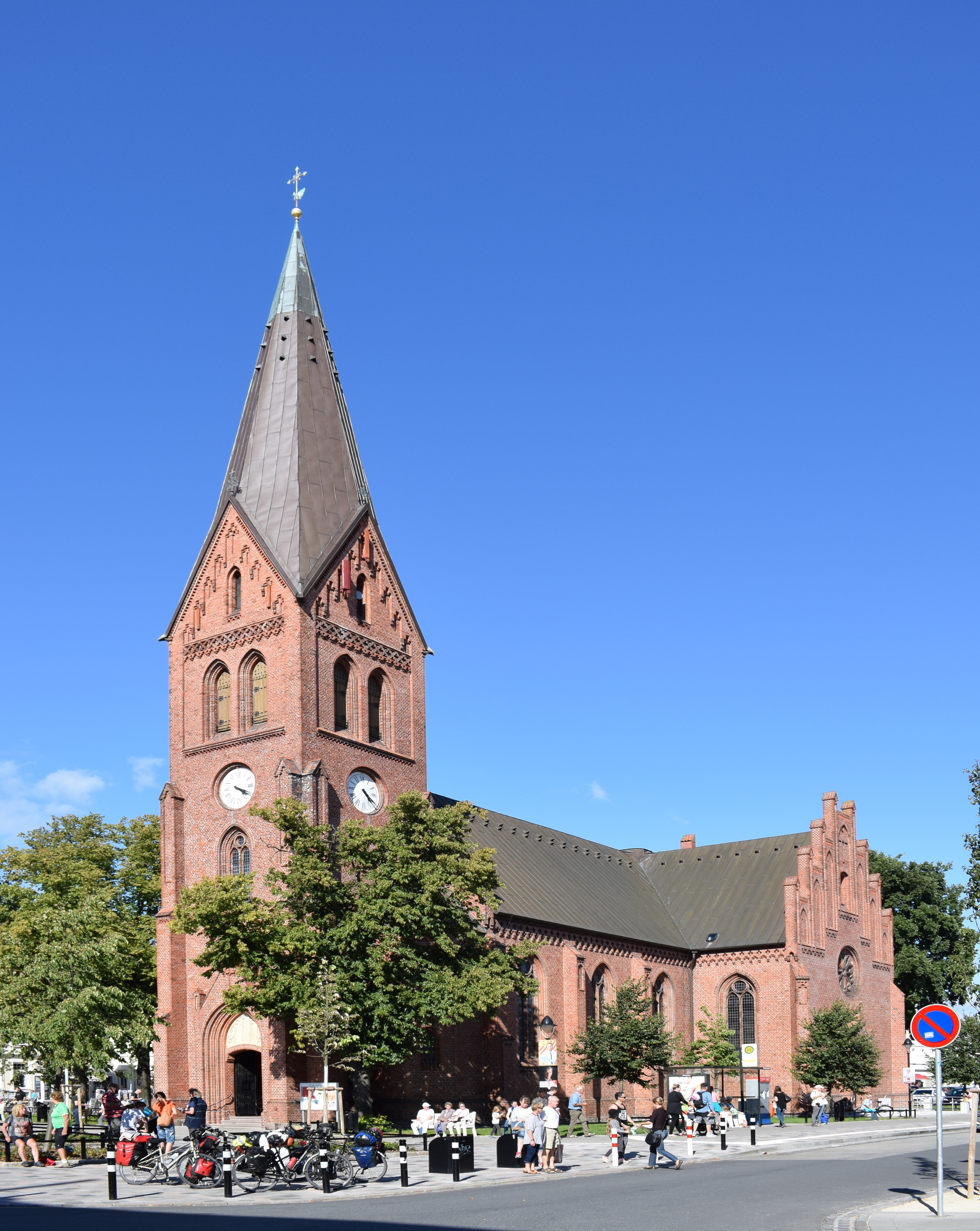 Pfarrkirche Warnemünde